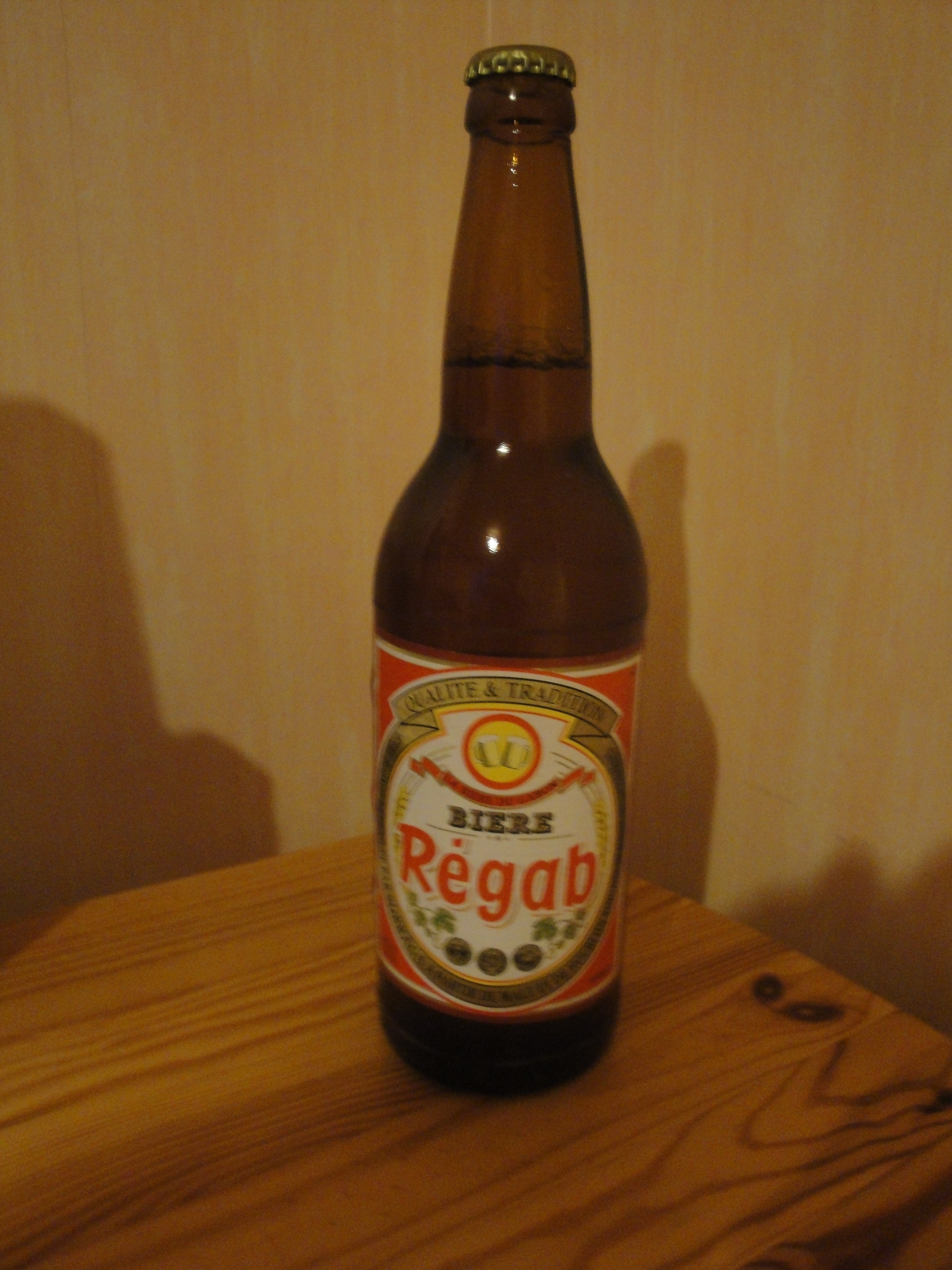 Régab est une célèbre bière gabonaise